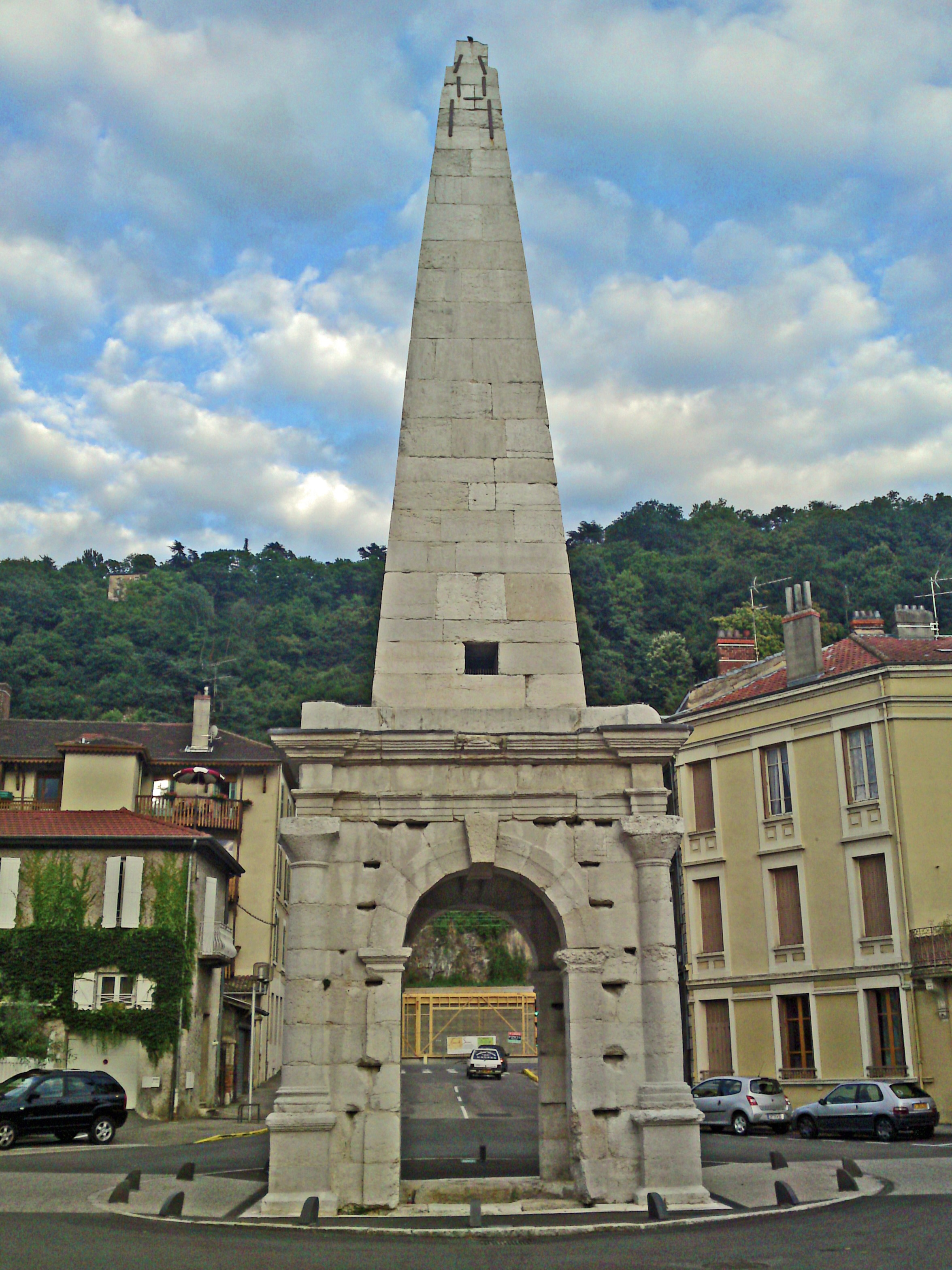 Pyramide de VIenne, Isère. Elle date de l'époque romaine, II° siècle de l'ère en cours en occident. Pendant la révolution française, elle a été coiffée d'un bonnet phrygien